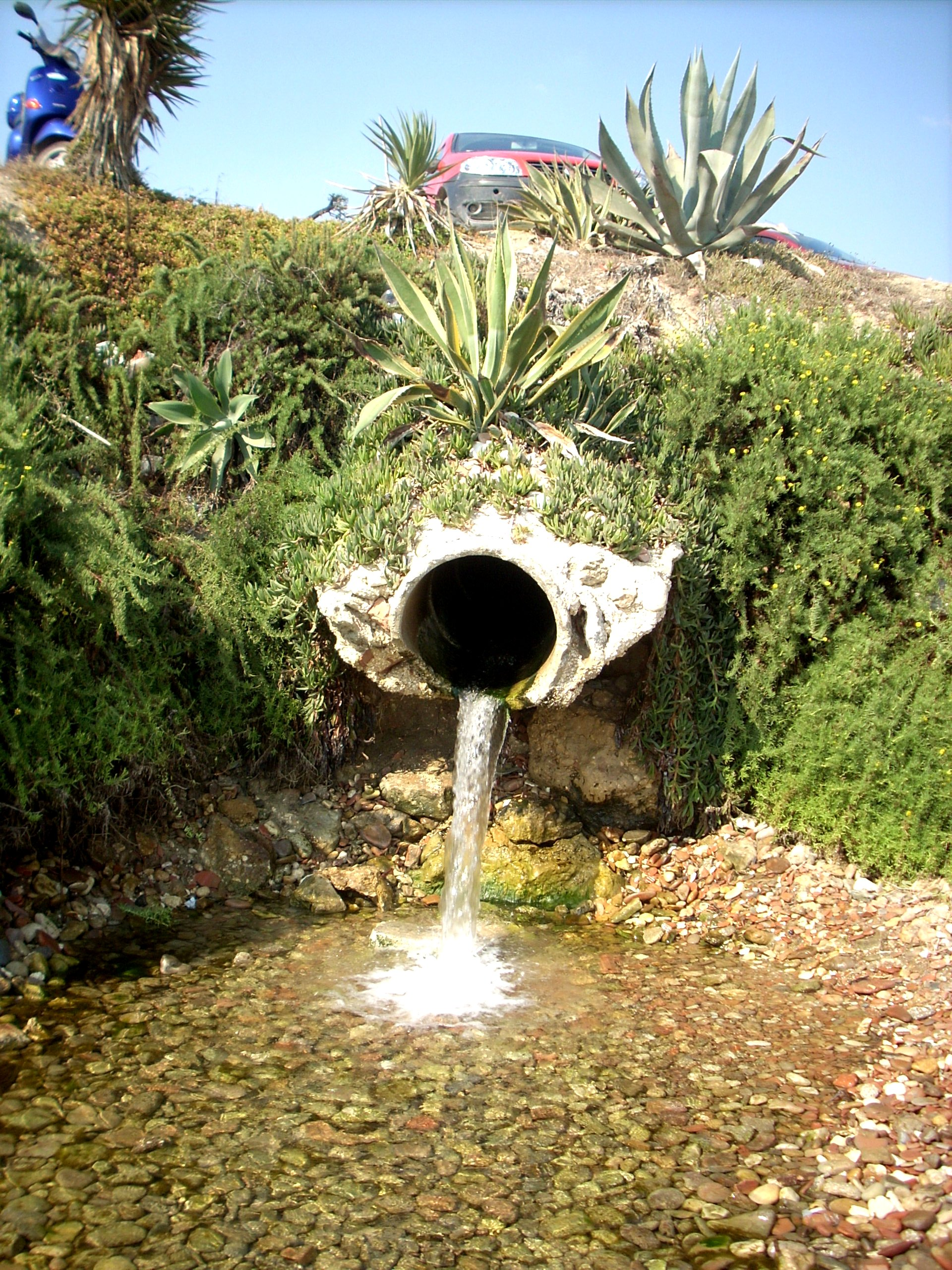 Le Terme di Sciacca sono tra più rinomate della Sicilia, conosciute ed apprezzate fin dai tempi degli antichi greci. Merito delle proprietà terapeutiche delle sue acque sulfuree ma anche della presenza unica al mondo delle grotte vaporose, le cosiddette Stufe di S. Calogero, che si trovano sulla vetta del monte Kronio e che la leggenda vuole fossero state scoperte da Dedalo, in fuga da Creta L’origine dell’utilizzo delle Terme di Sciacca è da ricercare nientemeno che nella mitologia greca: pare infatti che Dedalo, in fuga da Creta ove aveva realizzato il celebre labirinto, soggiornò presso la località siciliana e qui, dopo aver scoperto sul monte Kronio le grotte “vaporose”, vi allestì egli stesso un ingresso ricavando delle sedie dalla roccia. Furono invece i romani, cultori delle terme, a sfruttare per primi le acque (cui dettero il nome "Thermae Selinuntinae"), e giovarsi delle loro proprietà ma le prime notizie accreditate sul loro uso risale al Medioevo, quando nell’eremo di San Calogero i religiosi usavano curare gli infermi con l’uso delle “stufe” termali la cui popolarità si diffuse nelle epoche successive al punto che la municipalità si trovò costretta a regolare l’accesso al luogo. A tale popolarità non corrispose, però, una razionalizzazione dell’utilizzo delle terme che si ebbe invece a metà del diciannovesimo secolo, dopo che due scienziati, Bellitti nel 1783 e Farina nel 1864, ebbero convalidato con i loro studi le qualità terapeutiche delle acque sulfuree di Sciacca. La cittadina uscì dal suo secolare isolamento solo a seguito dell’entrata in funzione di un collegamento ferroviario, in occasione della quale la municipalità promosse la costruzione di uno stabilimento termale